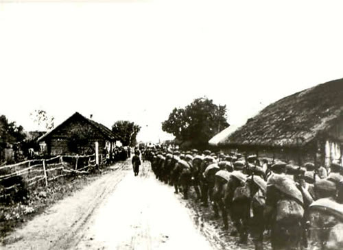 Беларуская (тарашкевіца): Савецкія войскі на падыходзе да Маладэчна